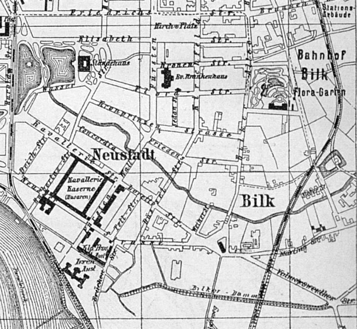 Unterbilk (Neustadt und Bilk), Illustration Plan der Stadt Düsseldorf, 1890